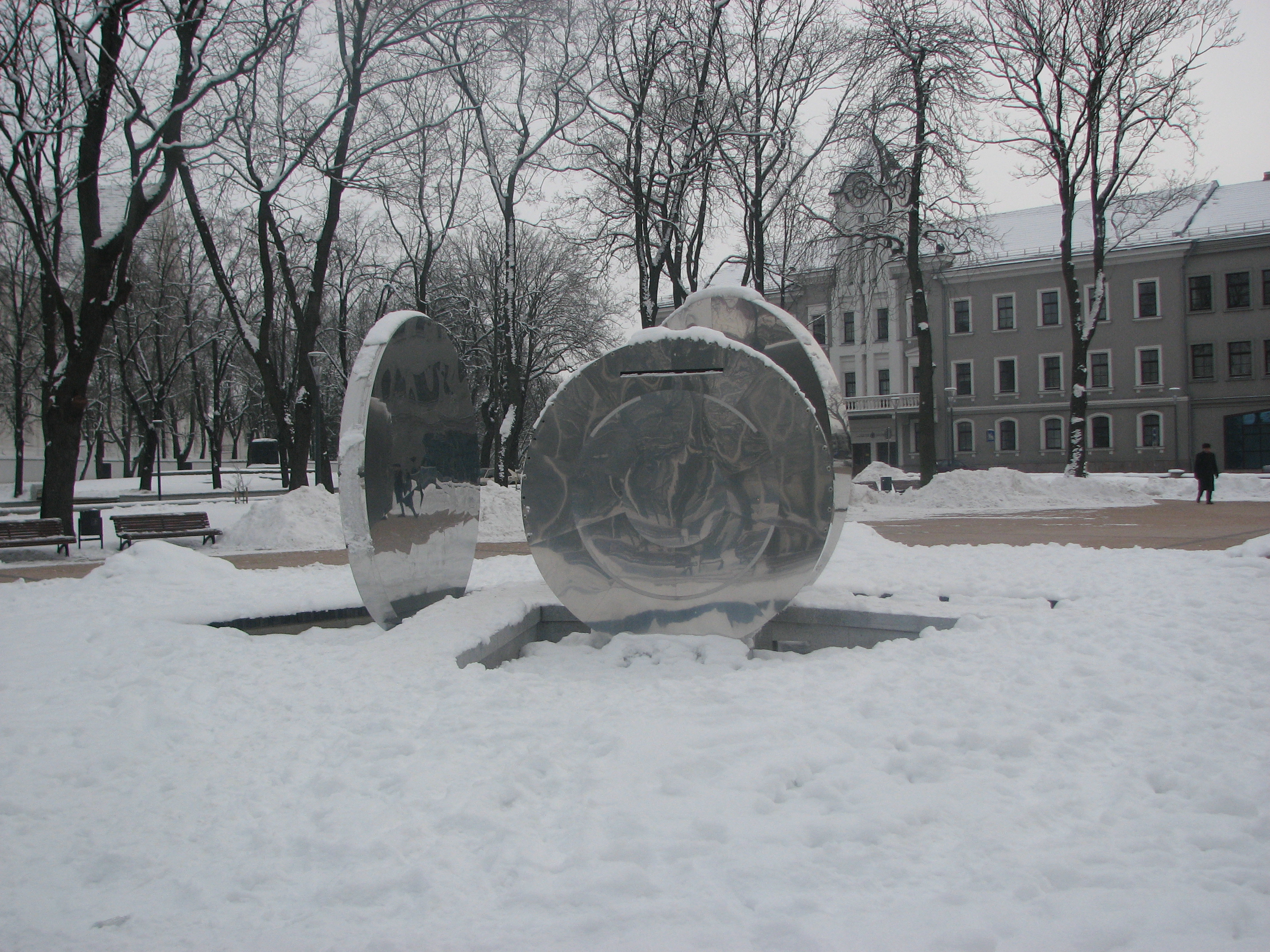 Šiauliai Lithuania